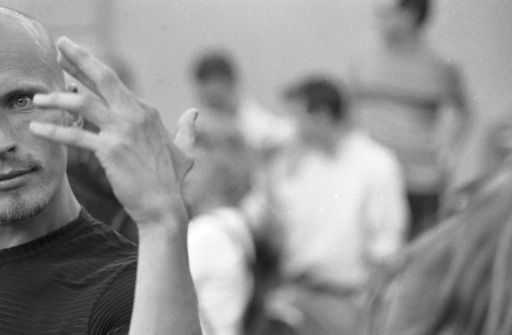 Union Move am 23. Mai 1998 in München auf der Leopoldstraße